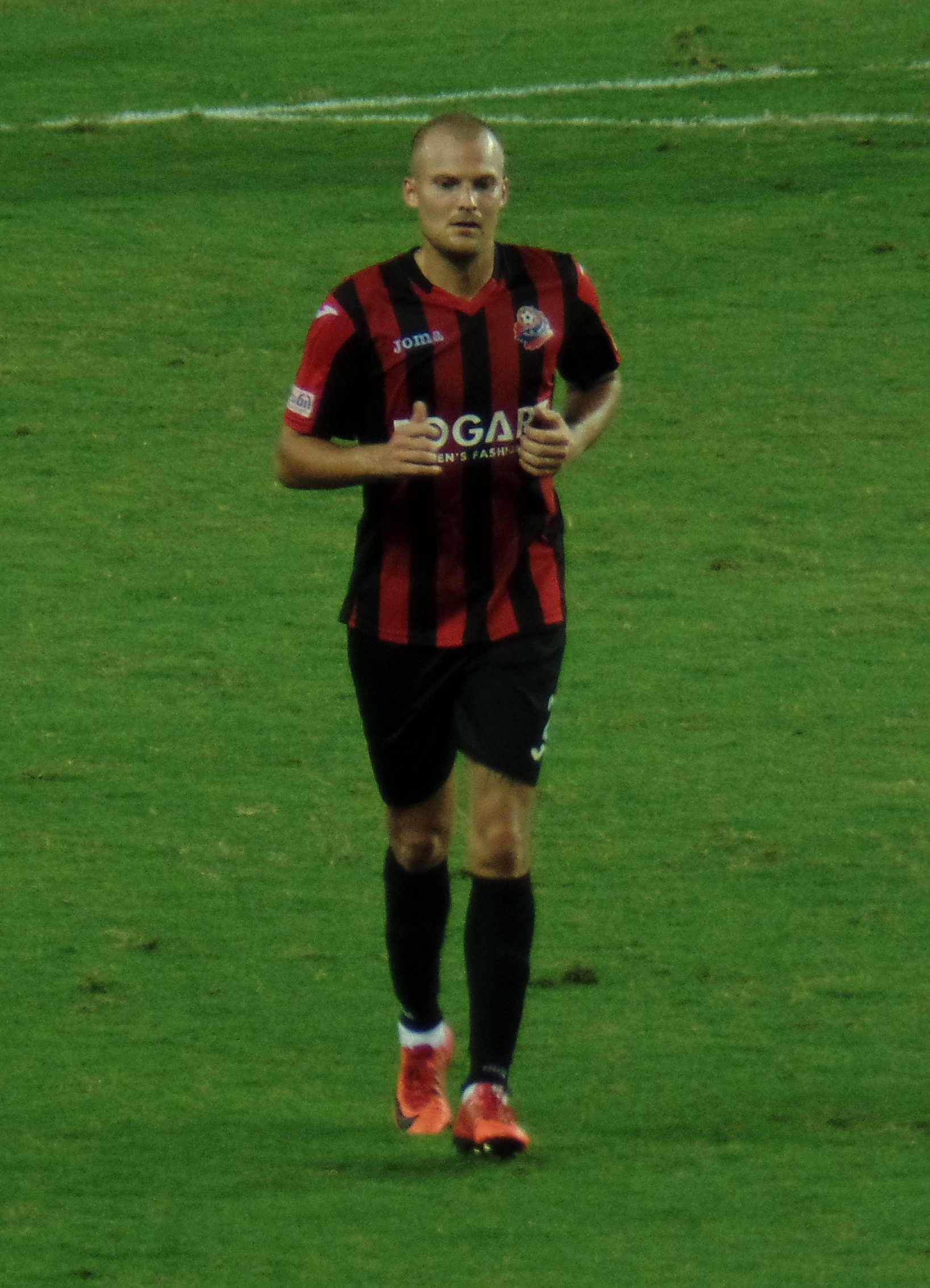 רסמוס סויסטט